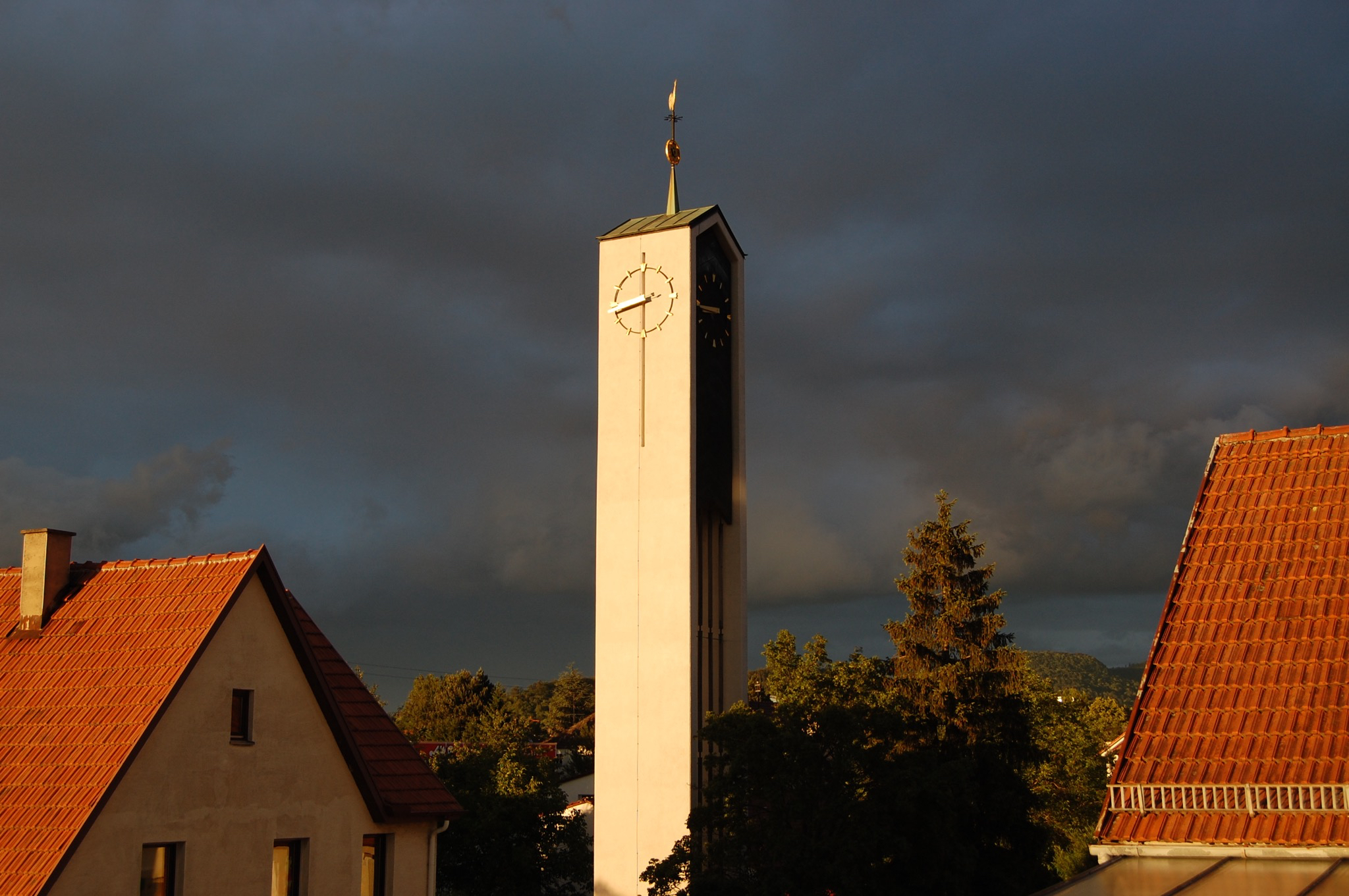 Der Kirchturm der Martin-Luther-Kirche in Mössingen im Licht der untergehenden Sonne.